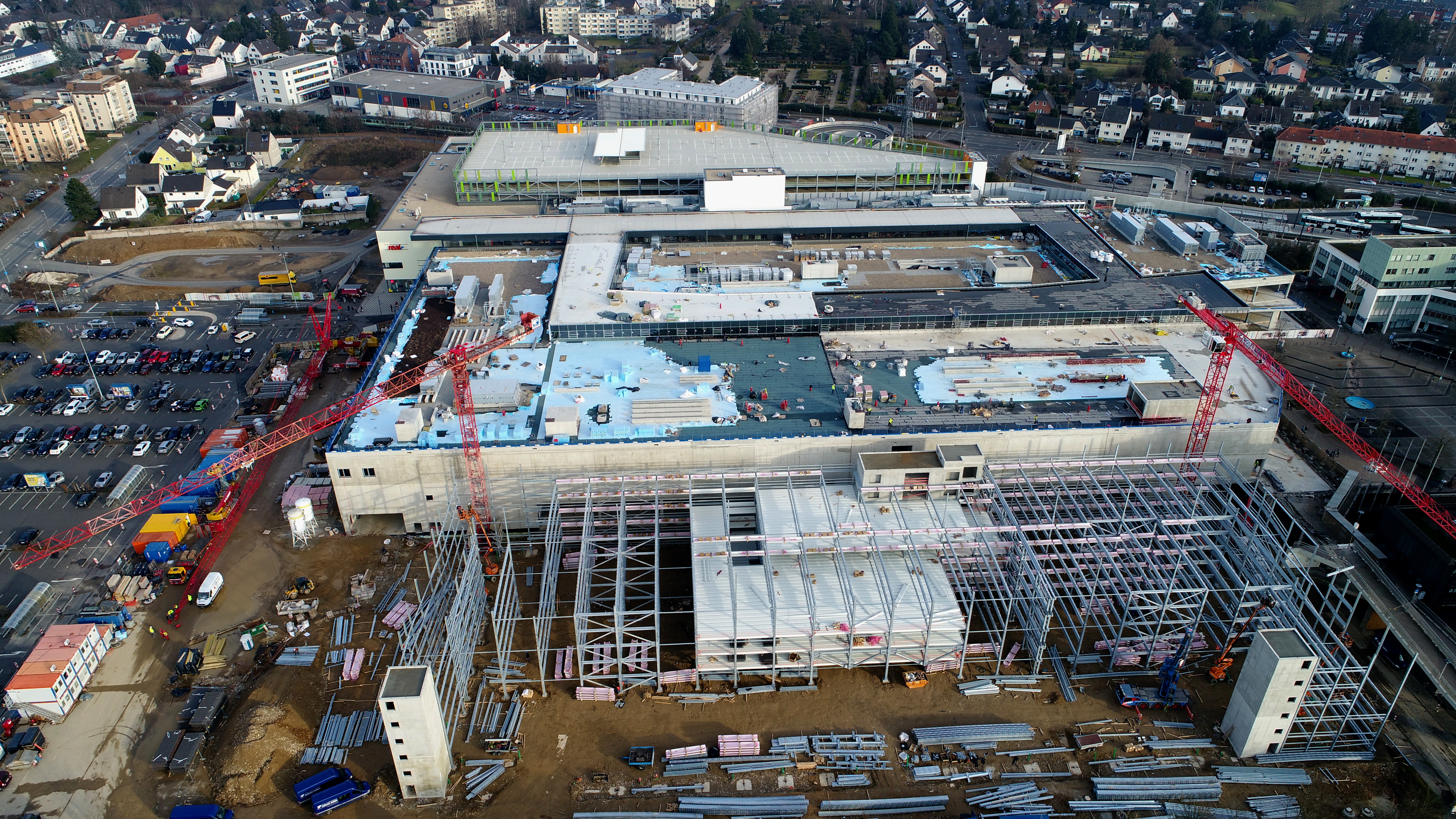 Sankt Augustin, Huma-Einkaufspark, Luftaufnahme (2017)